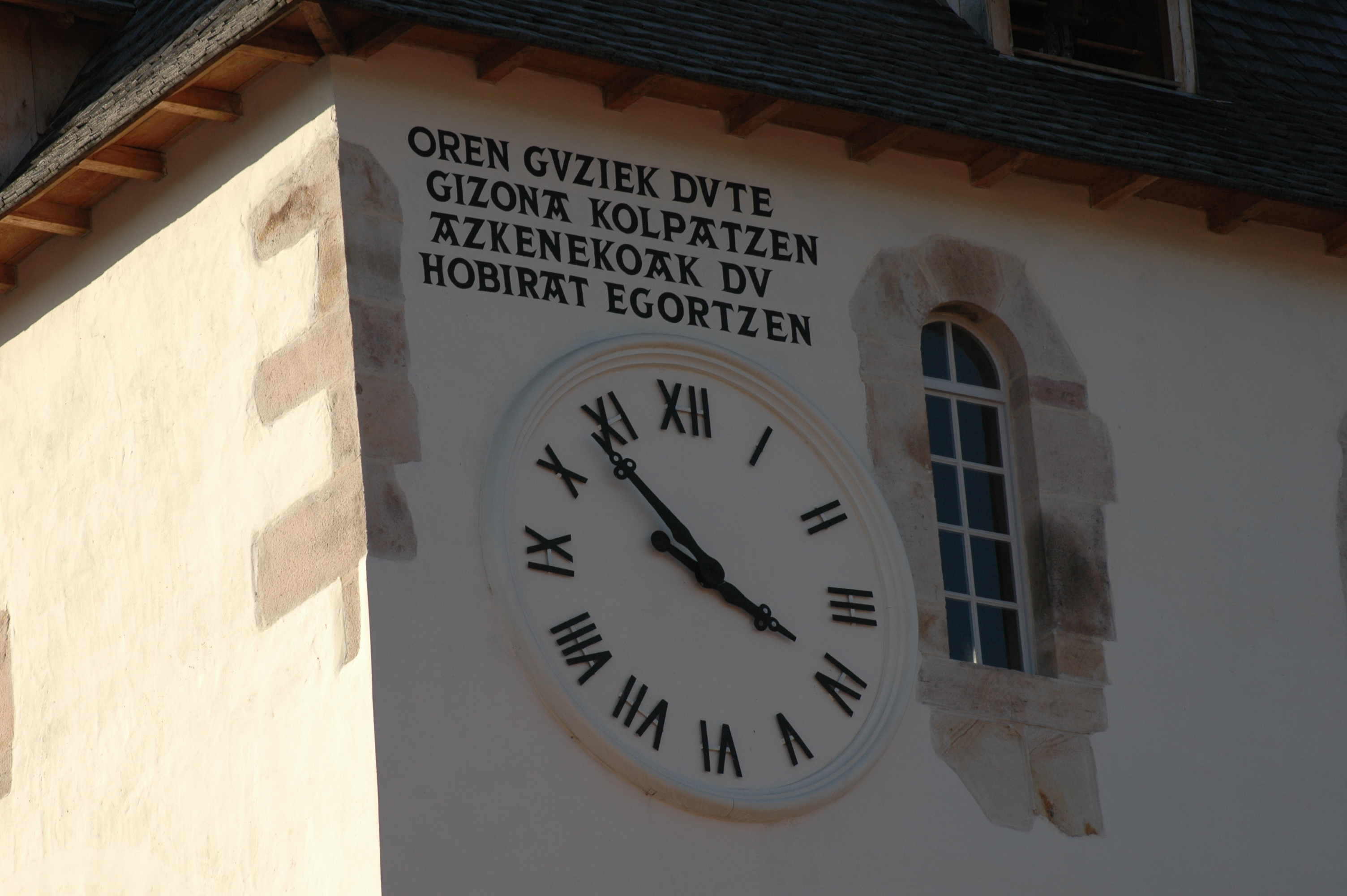 Sare, Pyrénées Atlantiques, France, l'horloge sur le clocher de l'église Saint-Martin